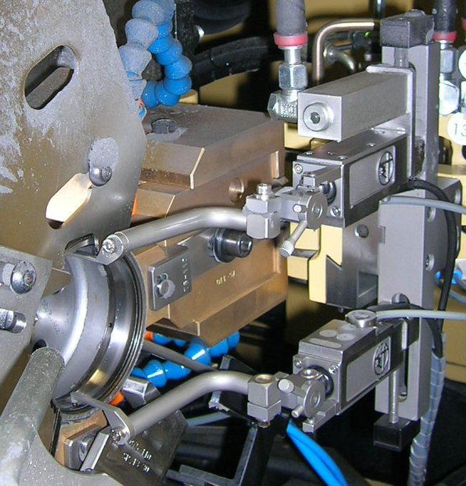 Messung eines Innendurchmessers mit einer Messsteuerung der Firma Marposs